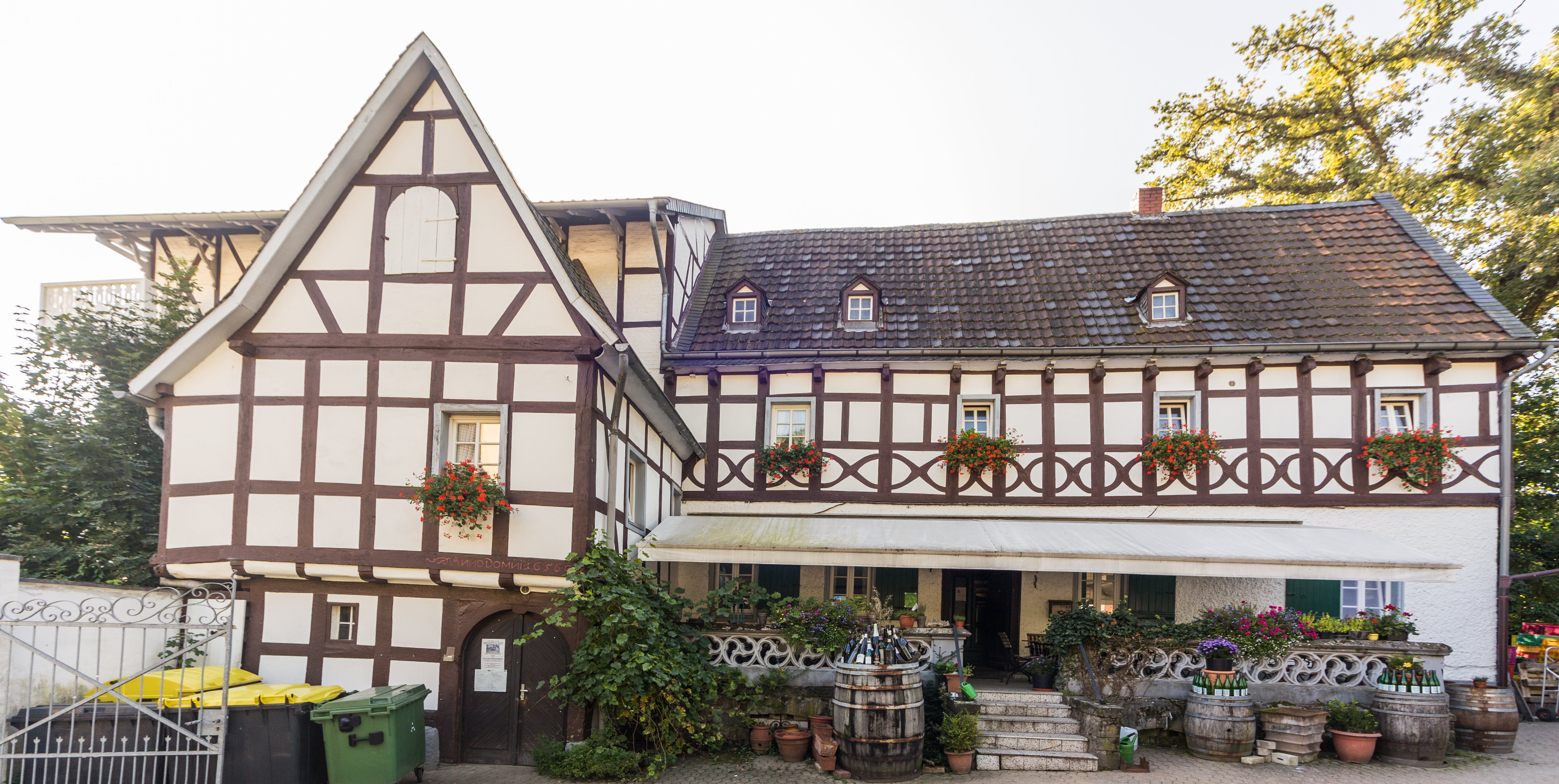 Gut Sülz, Bachstraße 157, Königswinter-Oberdollendorf: Ursprungsbau von 1656 This is a photograph of an architectural monument. 153